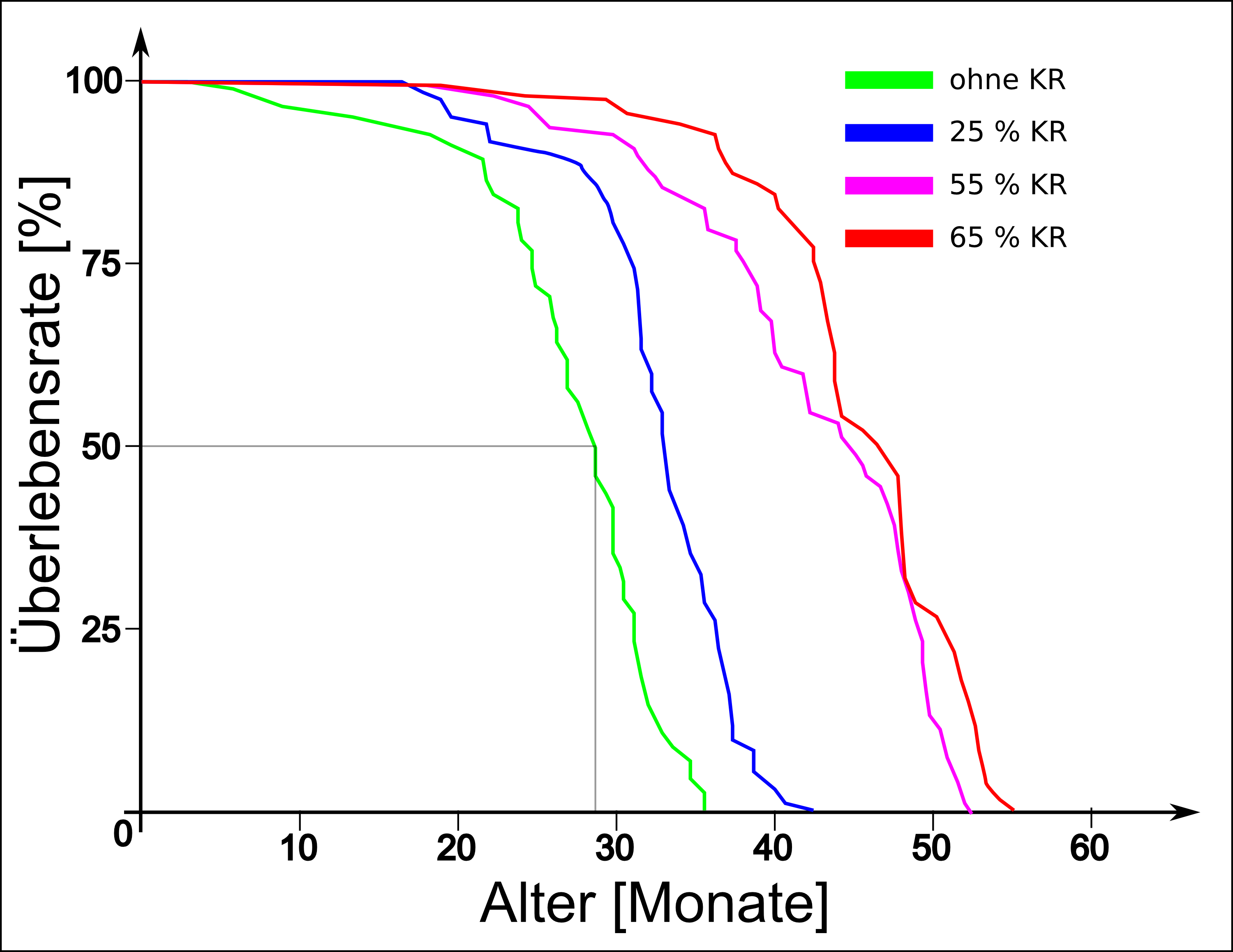 Auswirkungen der Kalorienrestriktion auf Labormäuse.